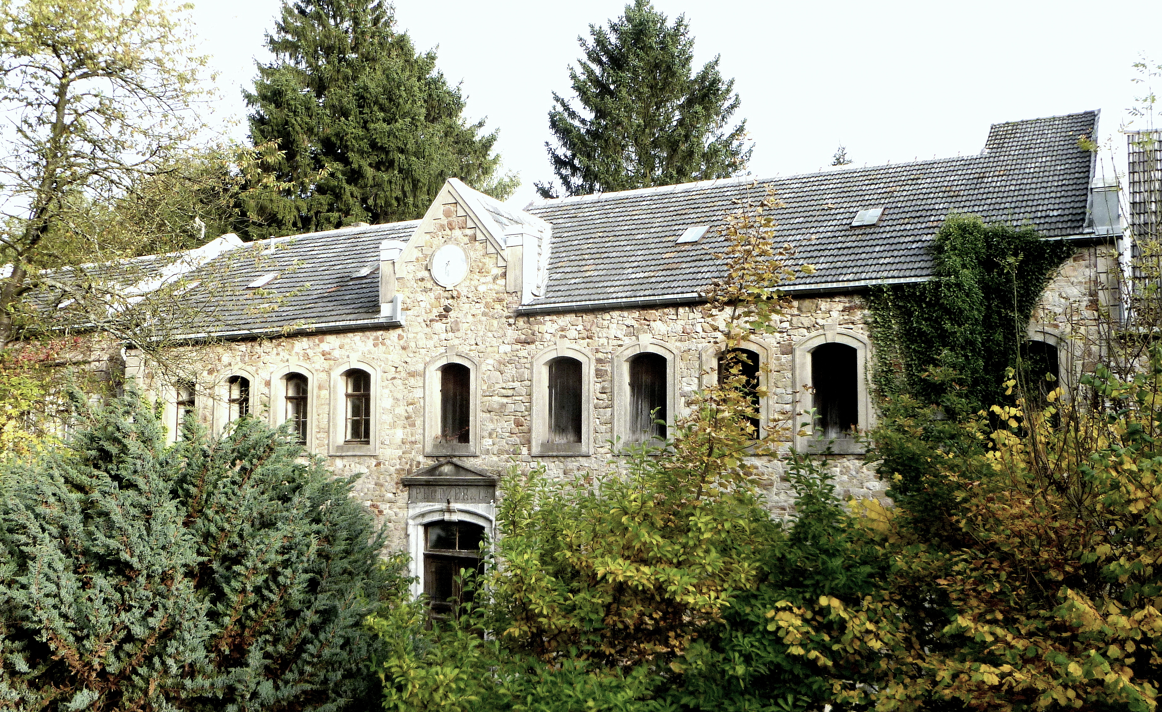 Baudenkmal in Eupen